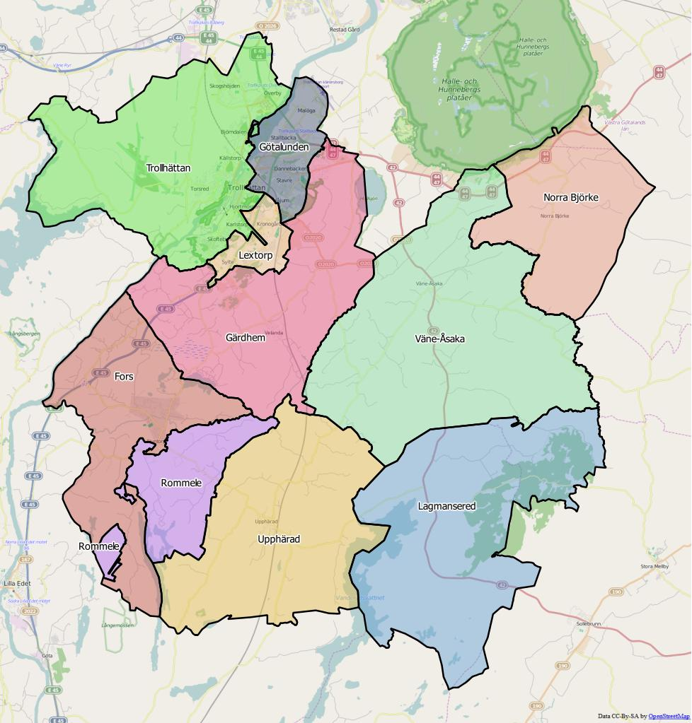 Distriktsindelningen i Trollhättans kommun World file: 55.76033494119347722 0 0 -55.76033494119347722 1348783.66283626109361649 8041715.3939796993508935